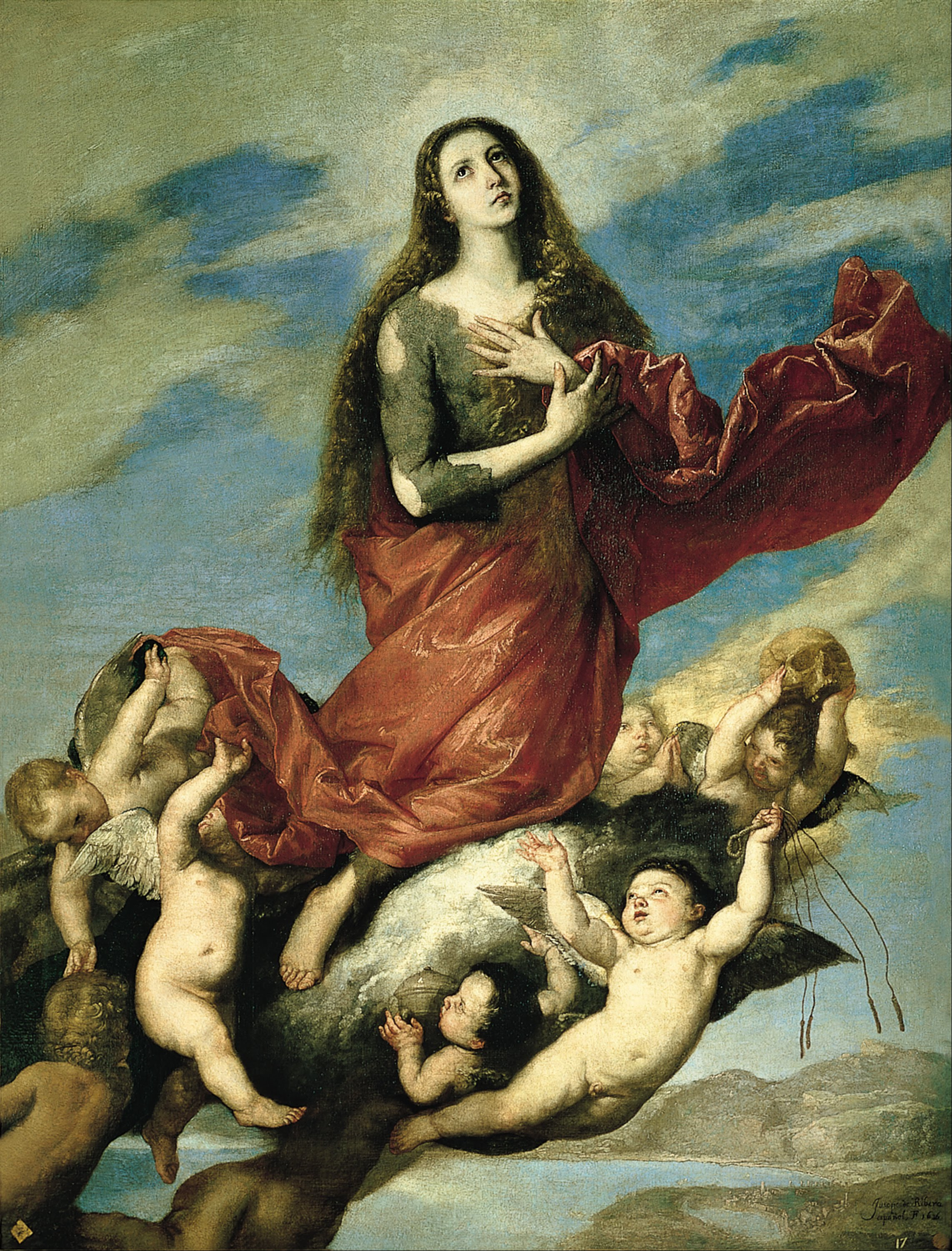 El lienzo muestra a Santa María Magdalena, una de las seguidoras de Jesucristo más cercanas a él, en actitud arrepentida y haciendo penitencia por sus pecados.